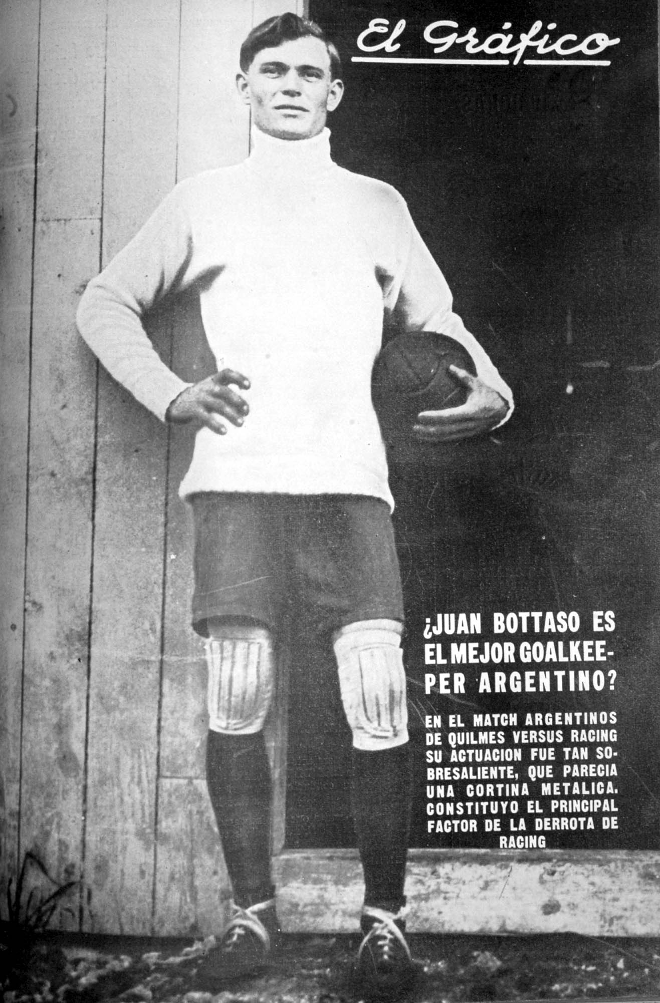 El Grafico del 30 de Abril de 1927. Edicion 408